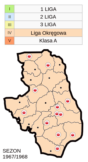 Jagiellonia w sezonie 1967/68- mapa klubów